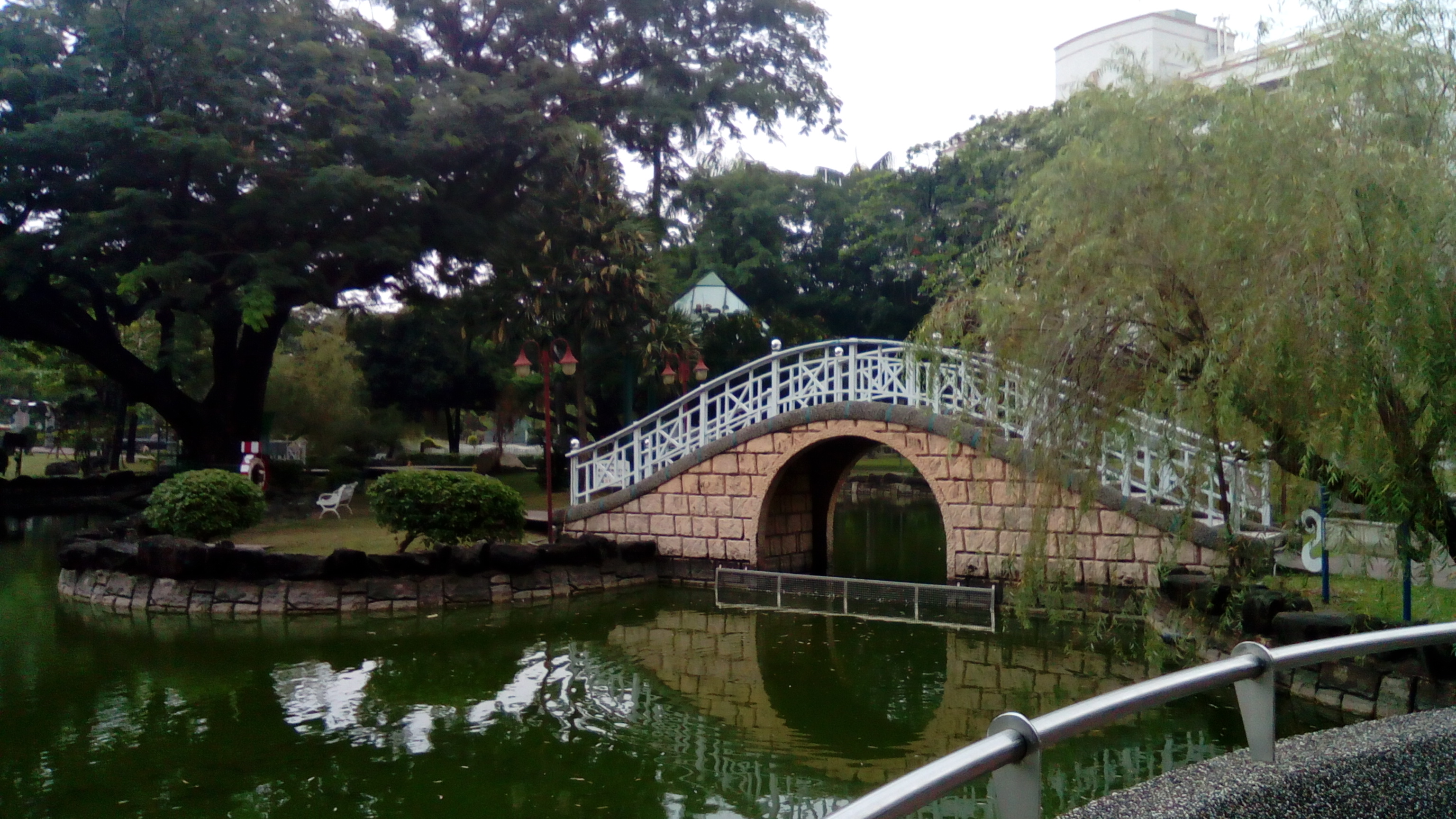 同上